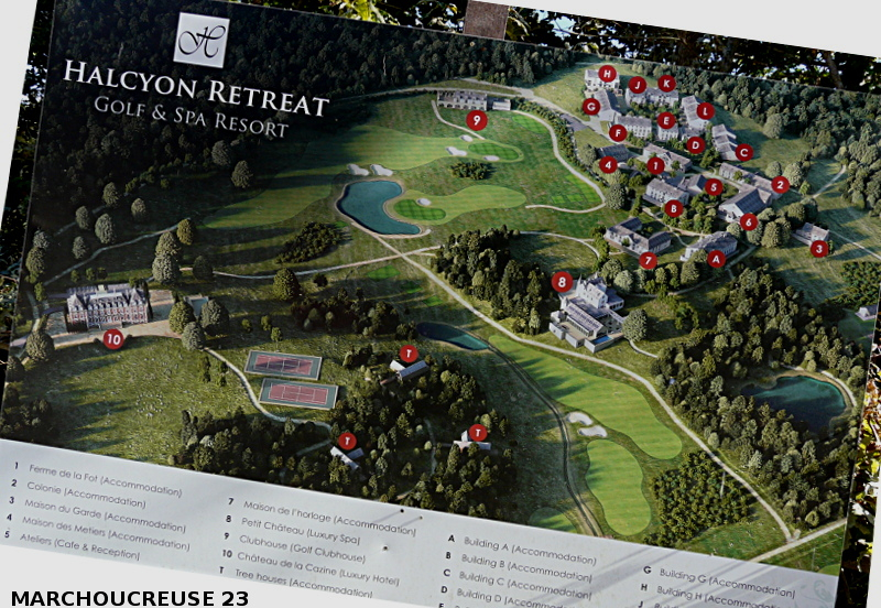 Complexe hôtelier du Château de la Cazine (château de la Fôt), Creuse, Nouvelle-Aquitaine, France